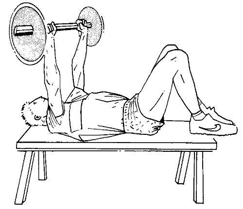 Musculation exercice développé couché 2.png